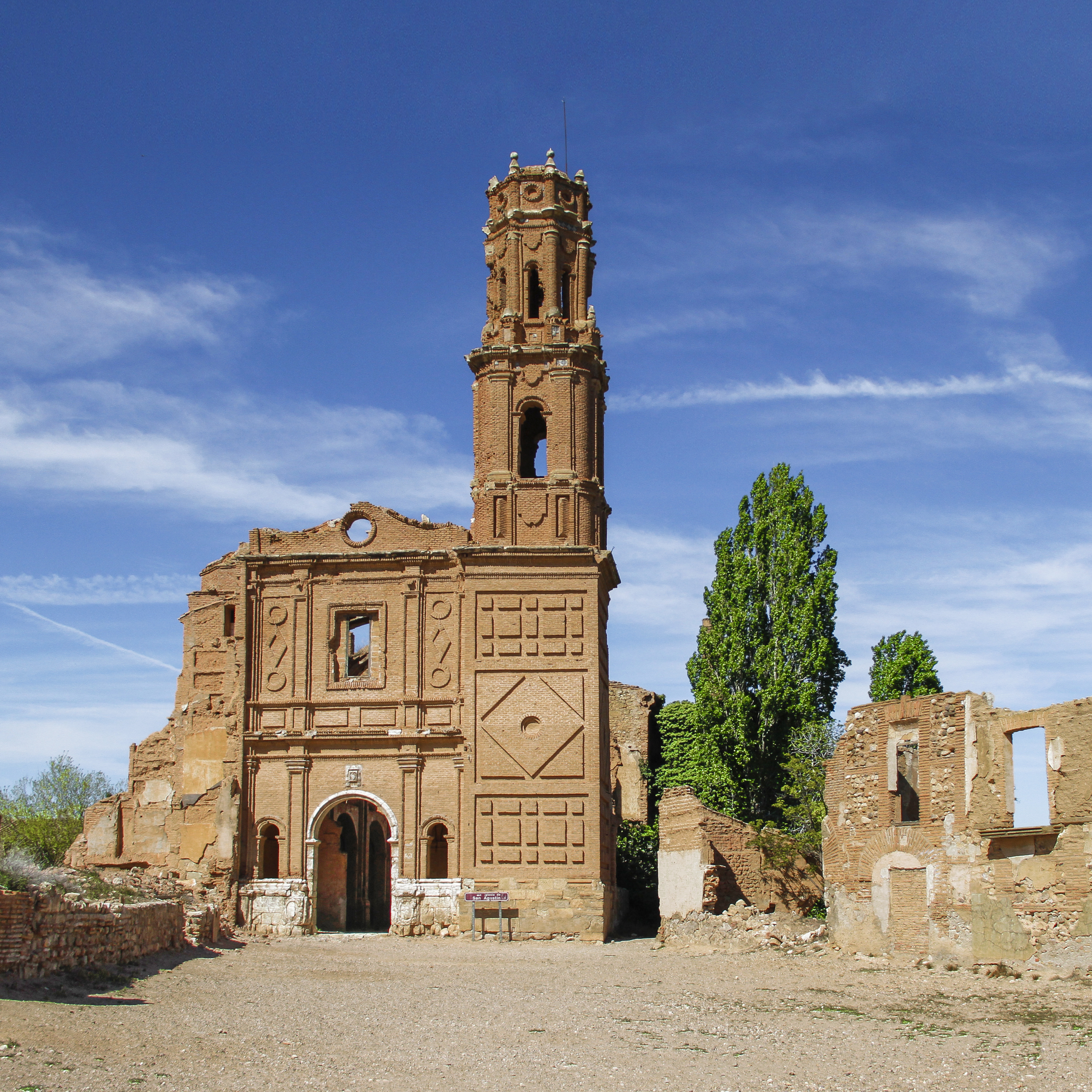 Iglesia de San Agustín, en Belchite, provincia de Zaragoza, Aragón, España